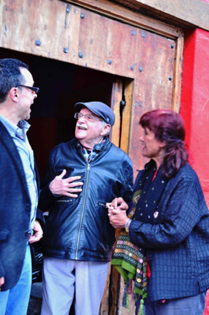 Santiago Garcia a la entrada del Teatro Gabriel Garcia Marquez en Bogota.